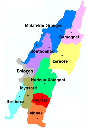 Carte du canton d'Izernore. Auteur : Rémi Dheyriat-Gauthier mars 2006 Licensing Catégorie:Carte Rhône-Alpes